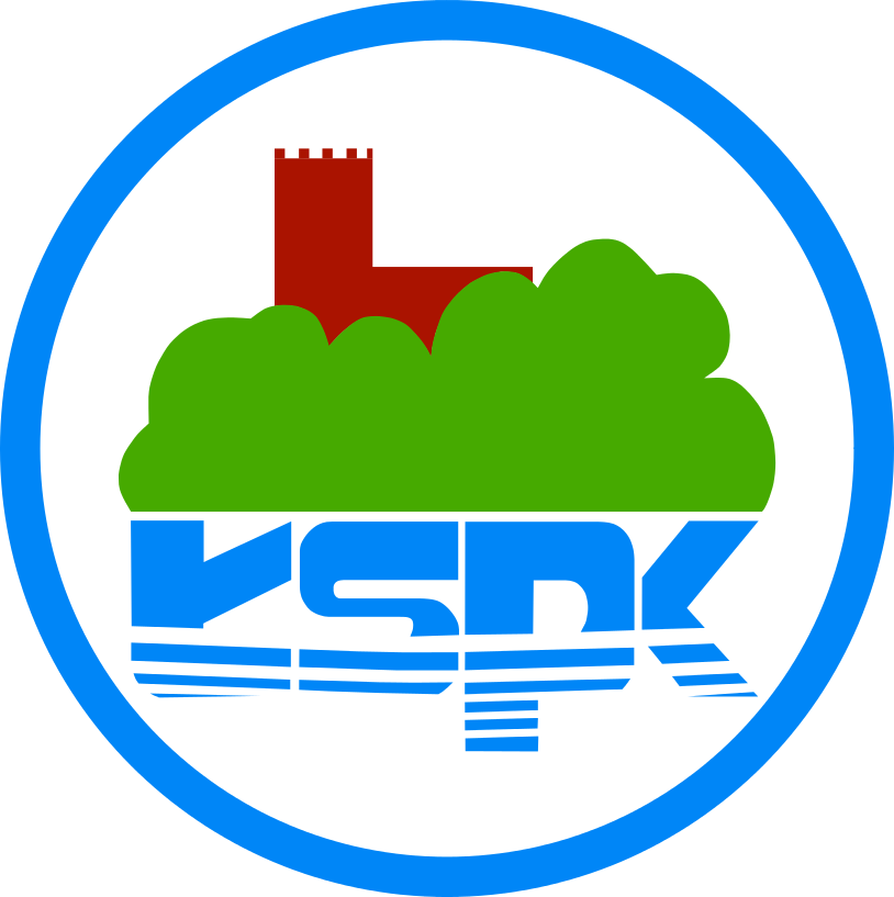 Logo Łagowsko-Sulęcińskiego Parku Krajobrazowego